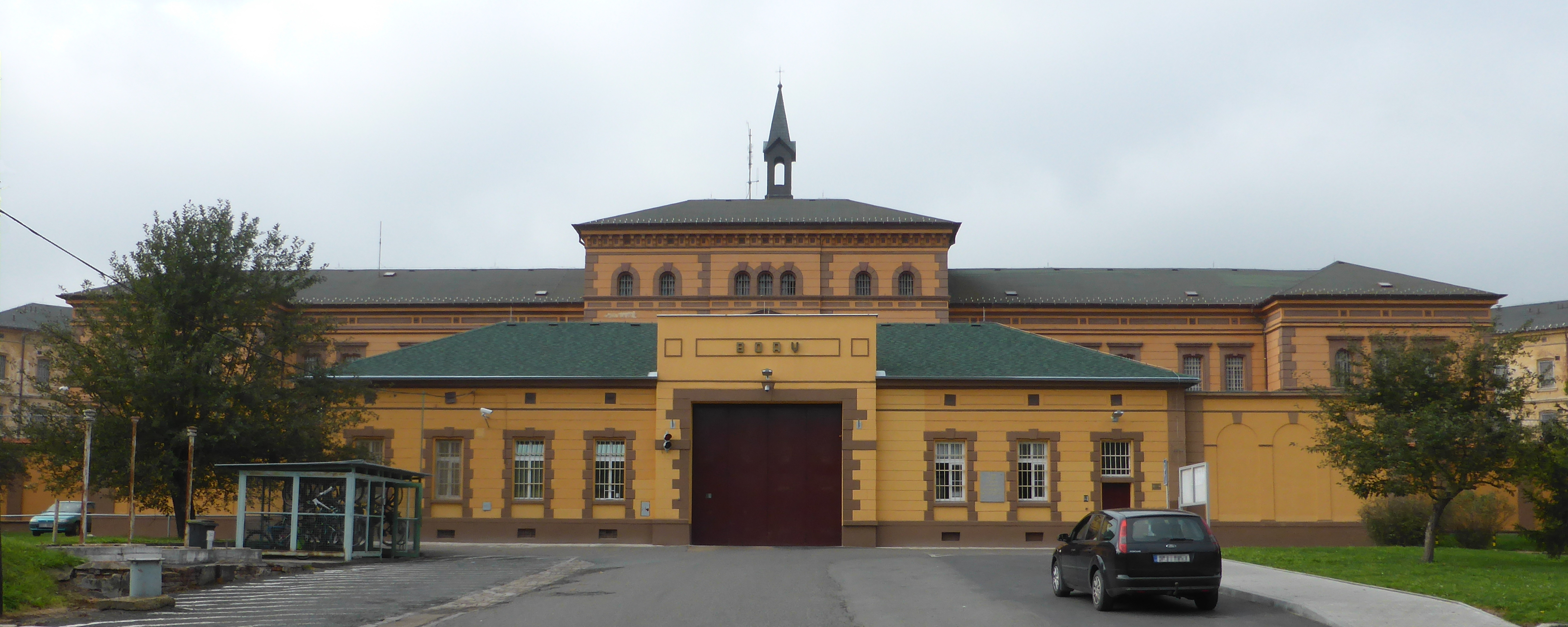 Věznice Plzeň-Bory, vchod